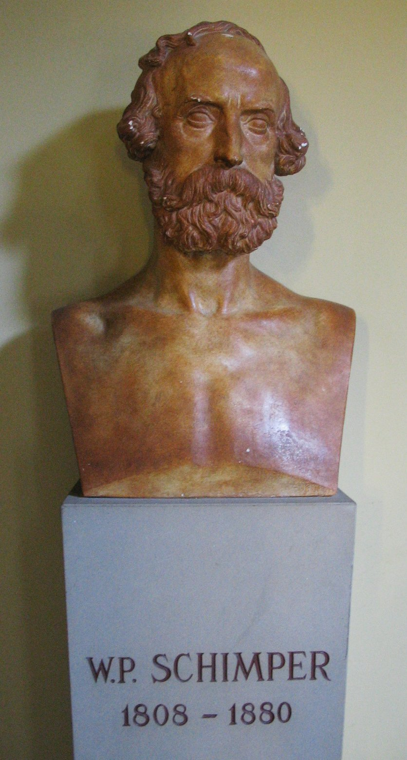 Buste de Guillaume Philippe (Wilhelm Philipp) Schimper exposé au Musée d'histoire naturelle de Strasbourg